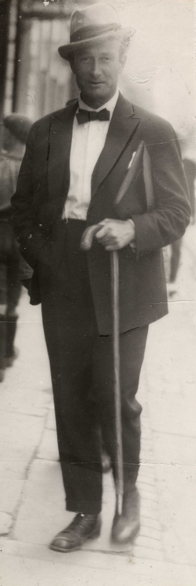 Skuespiller Thoralf Klouman fotografert ca. 1930.